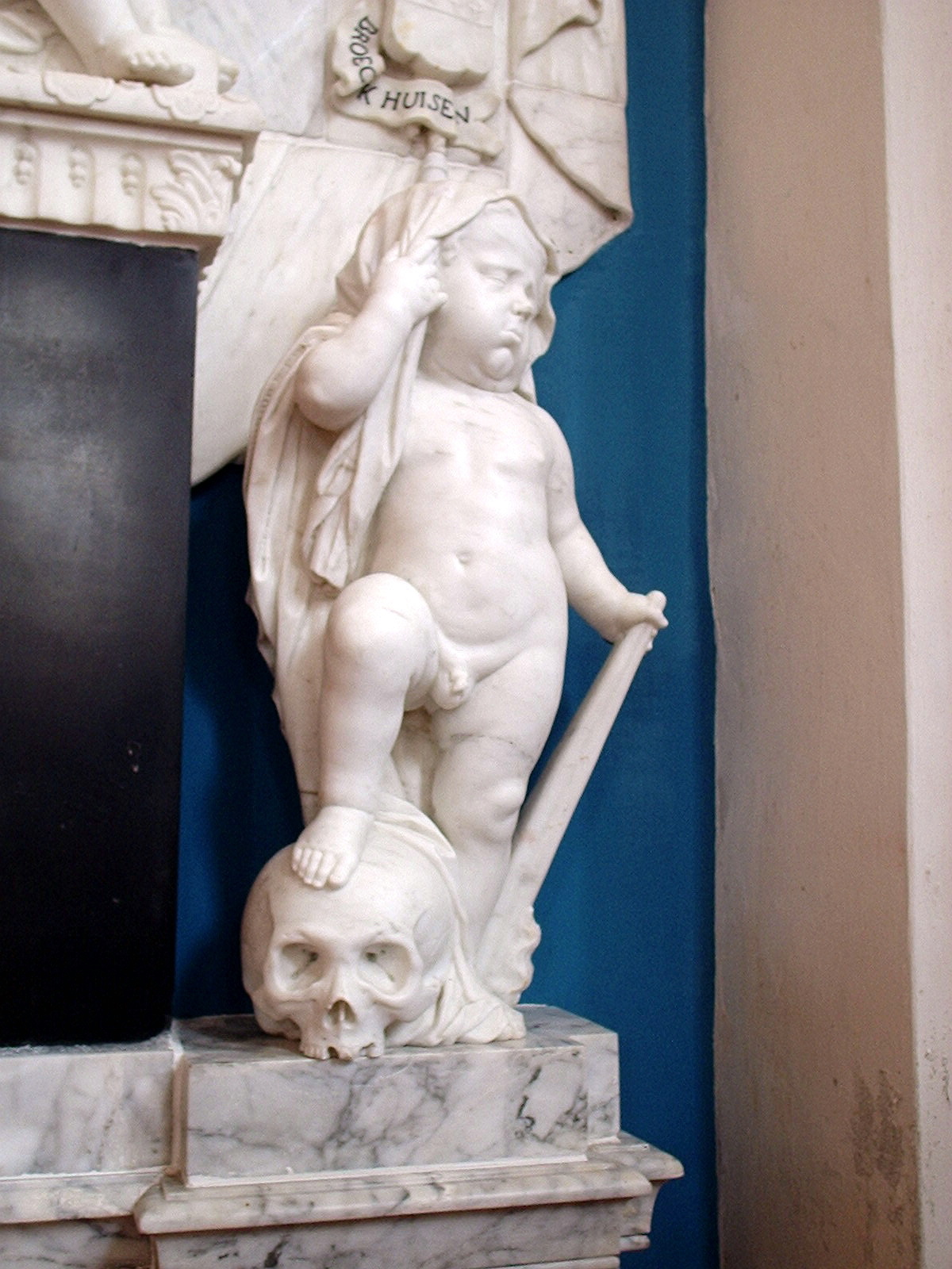 eigen foto